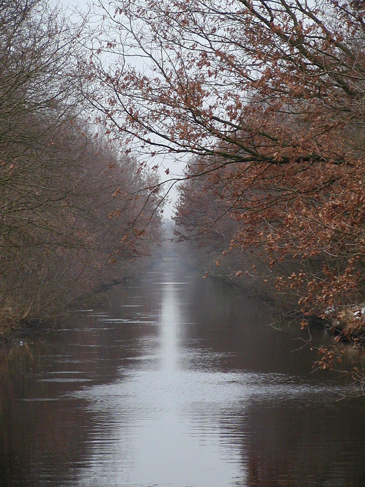 Der zugewachsener Kanal im Winter